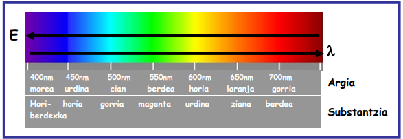 Kolorea zuzenki erlazionaturik dago xurgatutako argiarekin